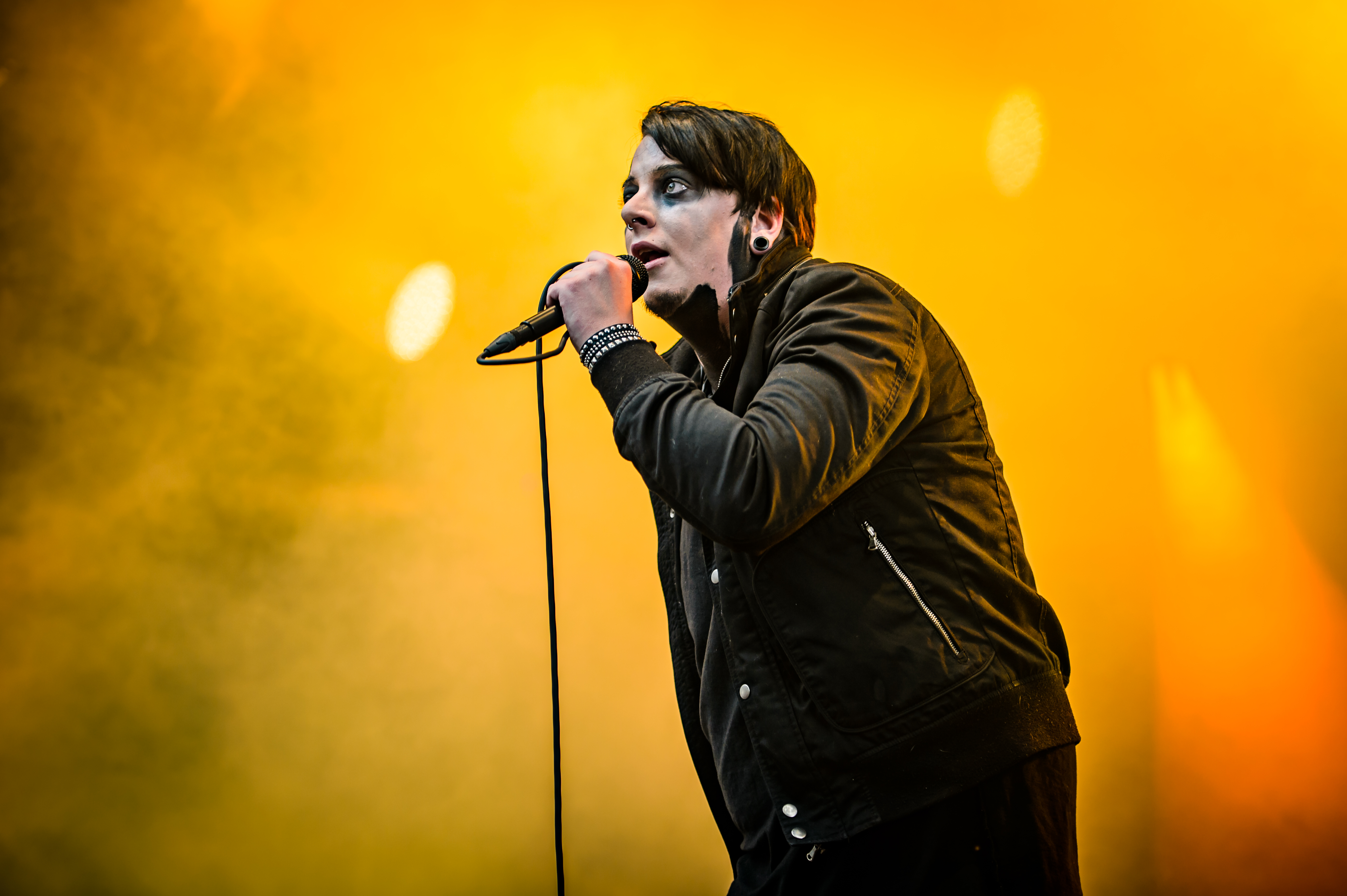 'Castle Rock 2017; Mülheim an der Ruhr': 'Erdling'